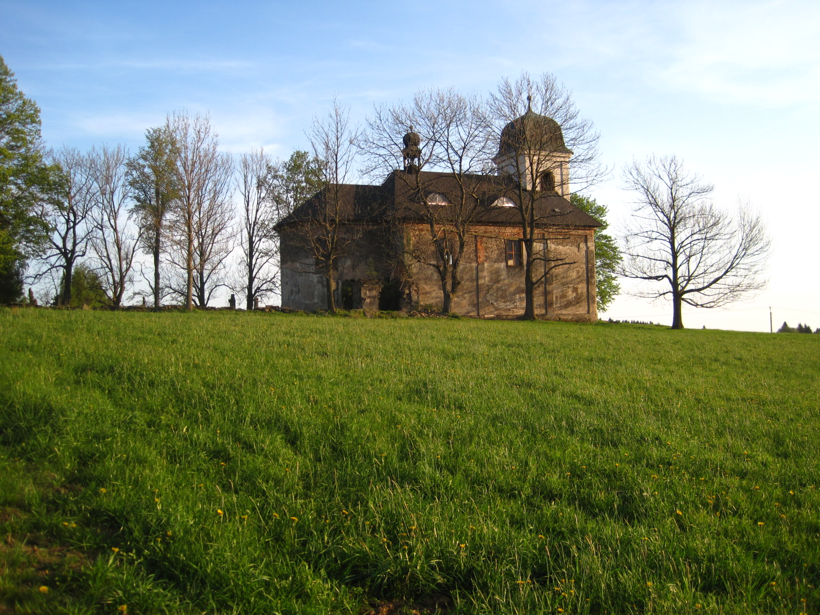 Kostel svatého Matouše, st. 70, pp. 478, 479, 1159, Jedlová v Orlických horách.